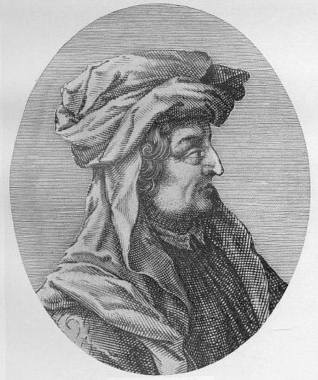 Leonardo Bruni (1369–1444), italienischer Humanist und Kanzler von Florenz. Stich von Theodor de Bry (aus Boissard, Icones virorum illustrium XVI p. 124.